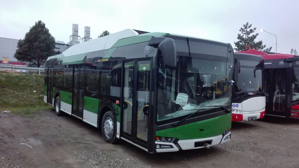 Prototipo bus elettrico ATM nel 2017.